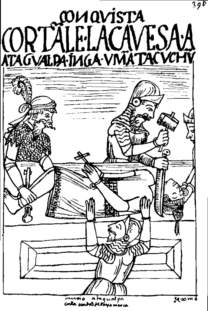 Dibujo de Felipe Guamán Poma de Ayala, que representa la muerte del Inca Atahualpa, por decapitación